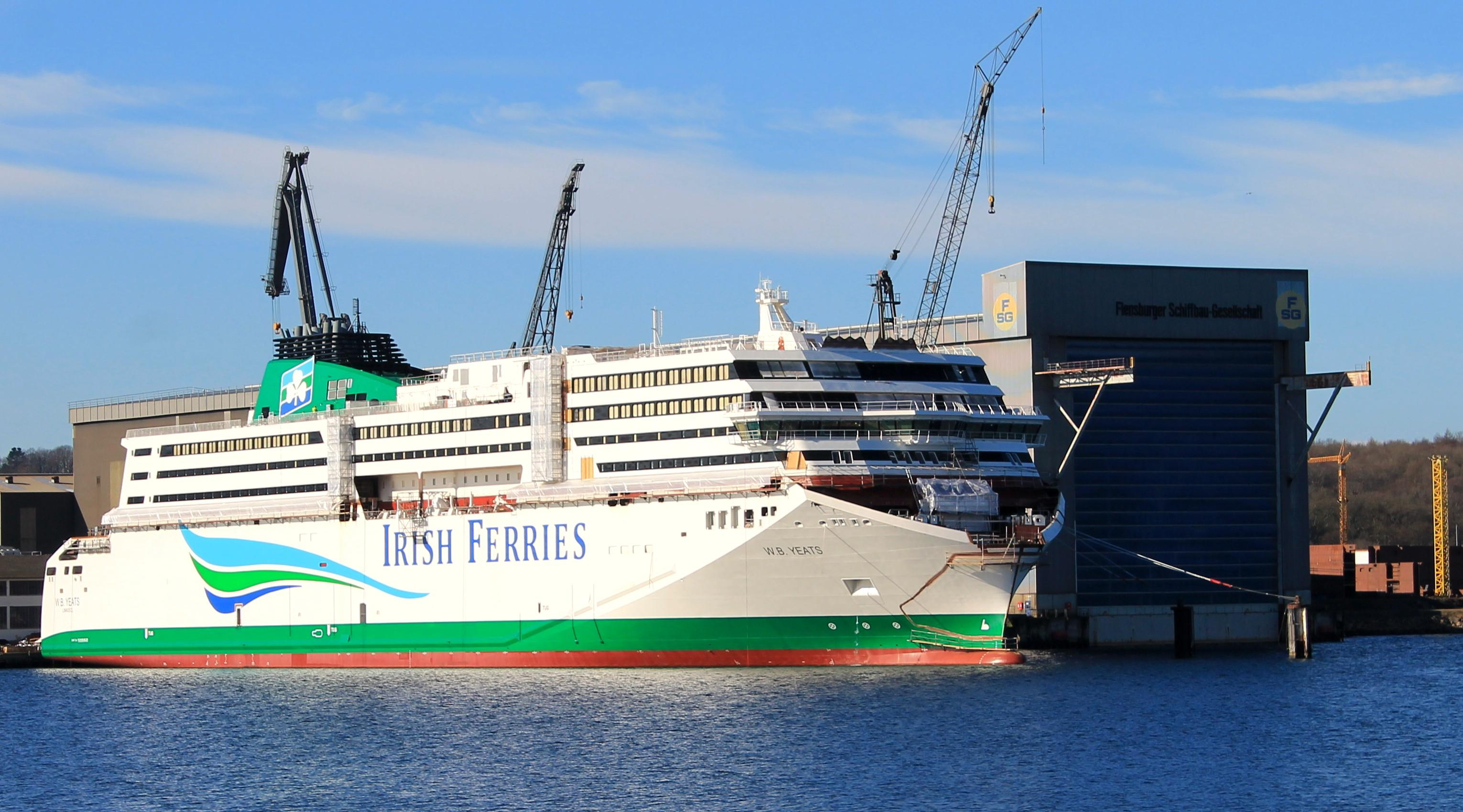 Die W. B. Yeats an der Ausrüstungspier der FSG